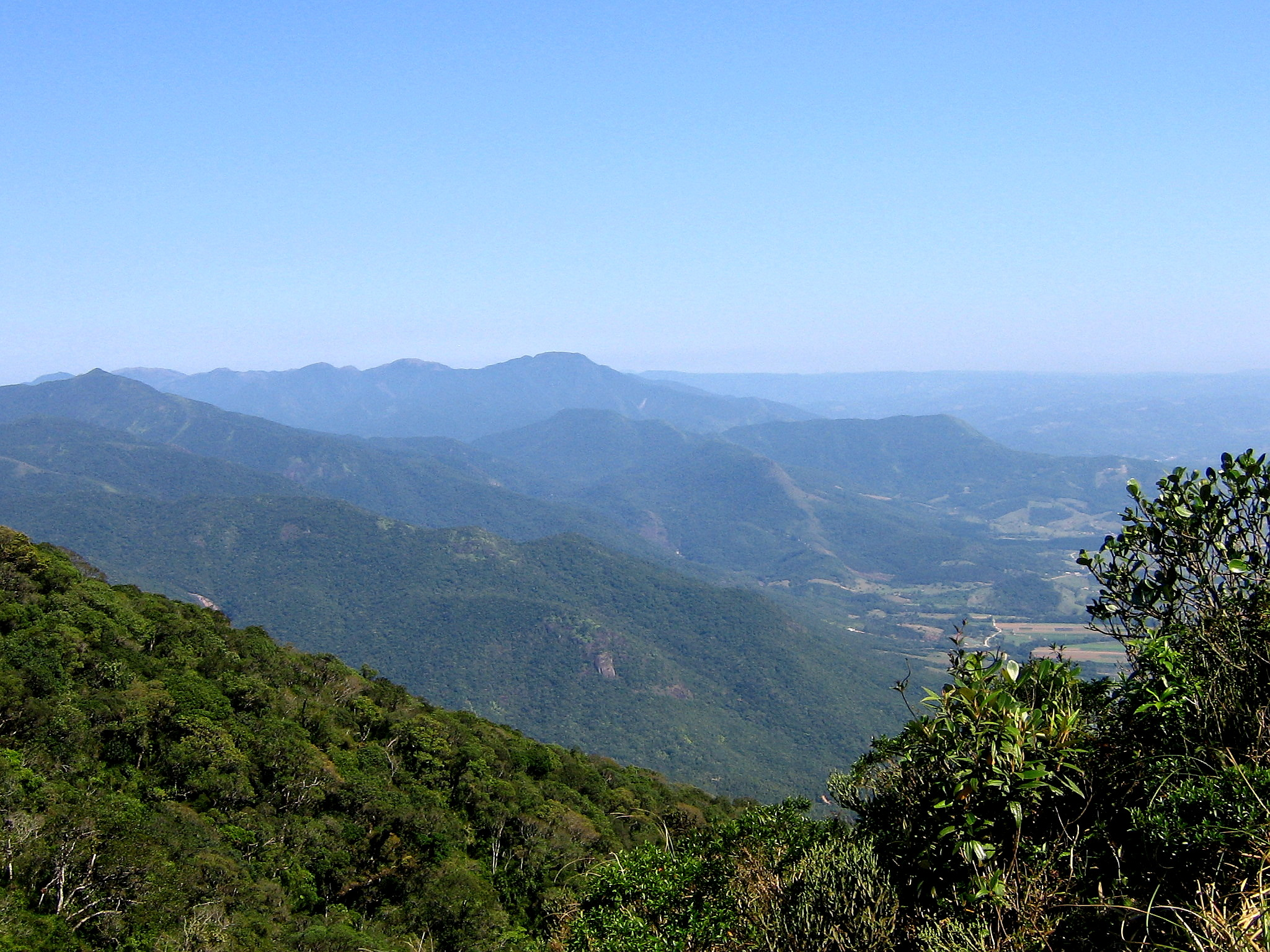 Manhã em cima do Cambirela. Sentido Oeste.